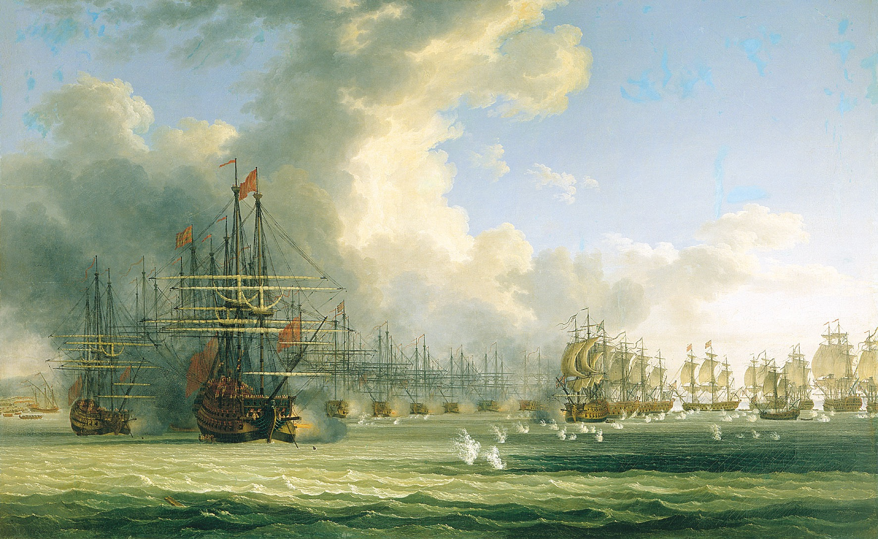 Это картина немецкого художника Якоба Филиппа Гаккерта «Начало боя в Хиосском проливе 24 июня 1770 года». Картина написана специально для Чесменского зала Большого Петергофского дворца в 1772 году. На картине описаны события Первой Архипелагской экспедиции русского флота — начало Хиосского сражения. Описание картины из автобиографических записок самого художника, обработаных Гете: Турецкий флот был построен у правого материкового берега вблизи Чесмы полукругом. Турецким кораблям с большим красно-зеленым флагом и красным вымпелом командовал капитан Баша. корабль с большим желто-красным флагом на высокой мачте был контр-адмиральским. кораблем с большим красным флагом на фок-мачте командовал второй контр-адмирал. На всех остальных турецких кораблях видны были красные флаги и вымпелы. На материке за флотом располагались сухопутныевойска, 30000 человек, чтобы воспрепятствовать высадке русских и при необходимости заменить экипажи кораблей. На картине видны только часть их, лагерь же и палатки закрыты кораблями и дымом. точно также из многочисленных галер, малых кораблей и шлюпок для транспортировки матросов видны только несколько.